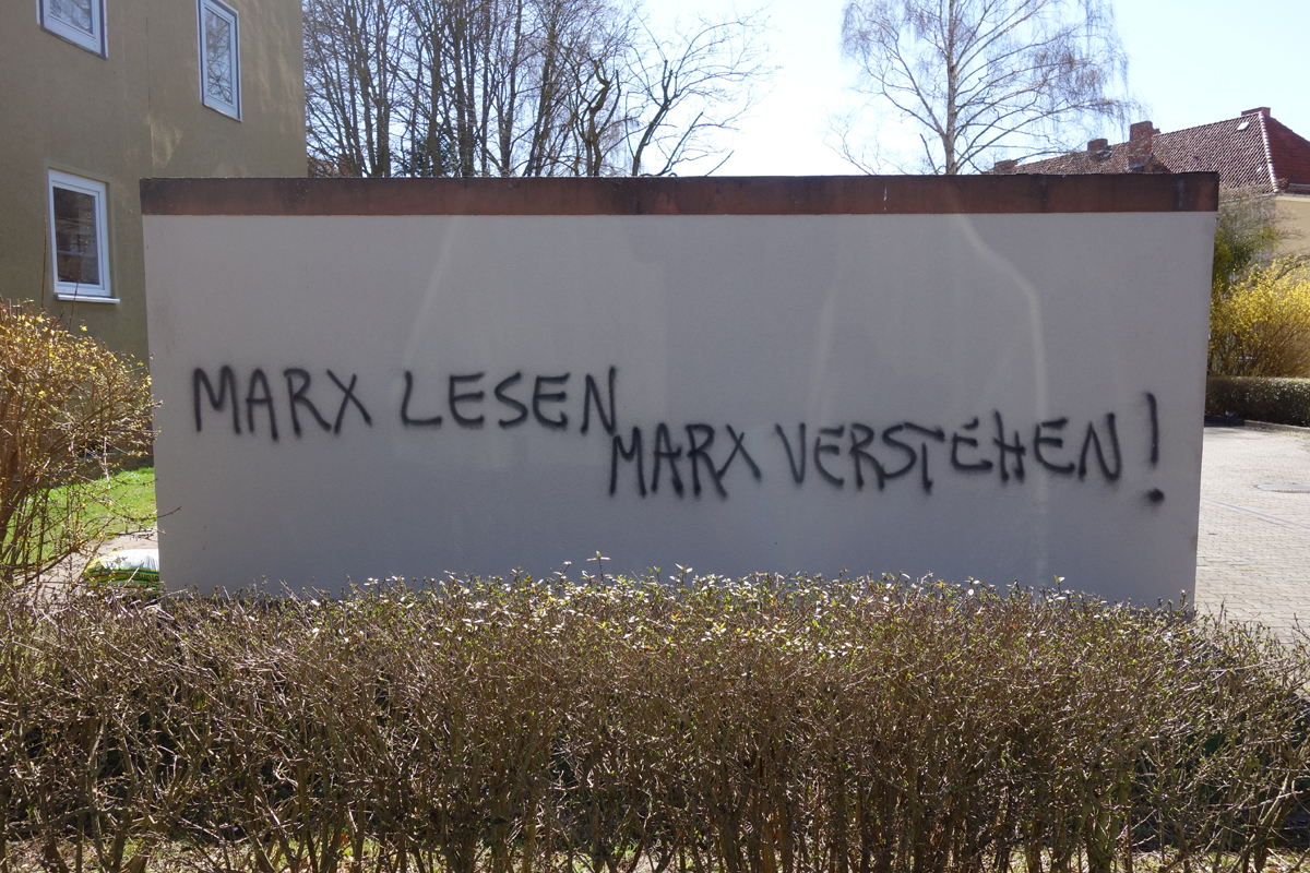 Graffito an Göttinger Garagenwand: Marx lesen Marx verstehen